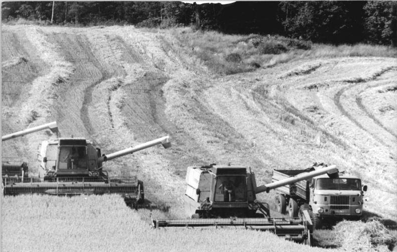 LPG Schönfels, Getreideernte ADN-ZB Thieme 24.8.85-th-Bez. Karl-Marx-Stadt: Getreideernte: In der LPG Pflanzenproduktion Schönfels, Landkreis Zwickau, sind gegenwärtig 26 Mähdrescher in vier Komplexen im Einsatz, um die ca. 2.500 ha Getreide zu ernten. Die Hanglagen in 500 Meter Höhe verlangen von den Mähdrescherfahrern der E 516 hohen fahrerisches Können.